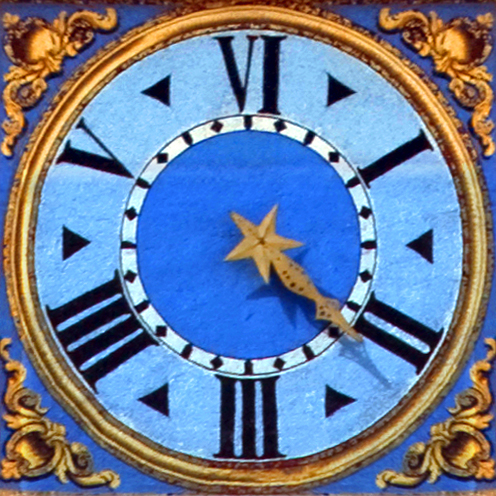 Palazzo del Quirinale